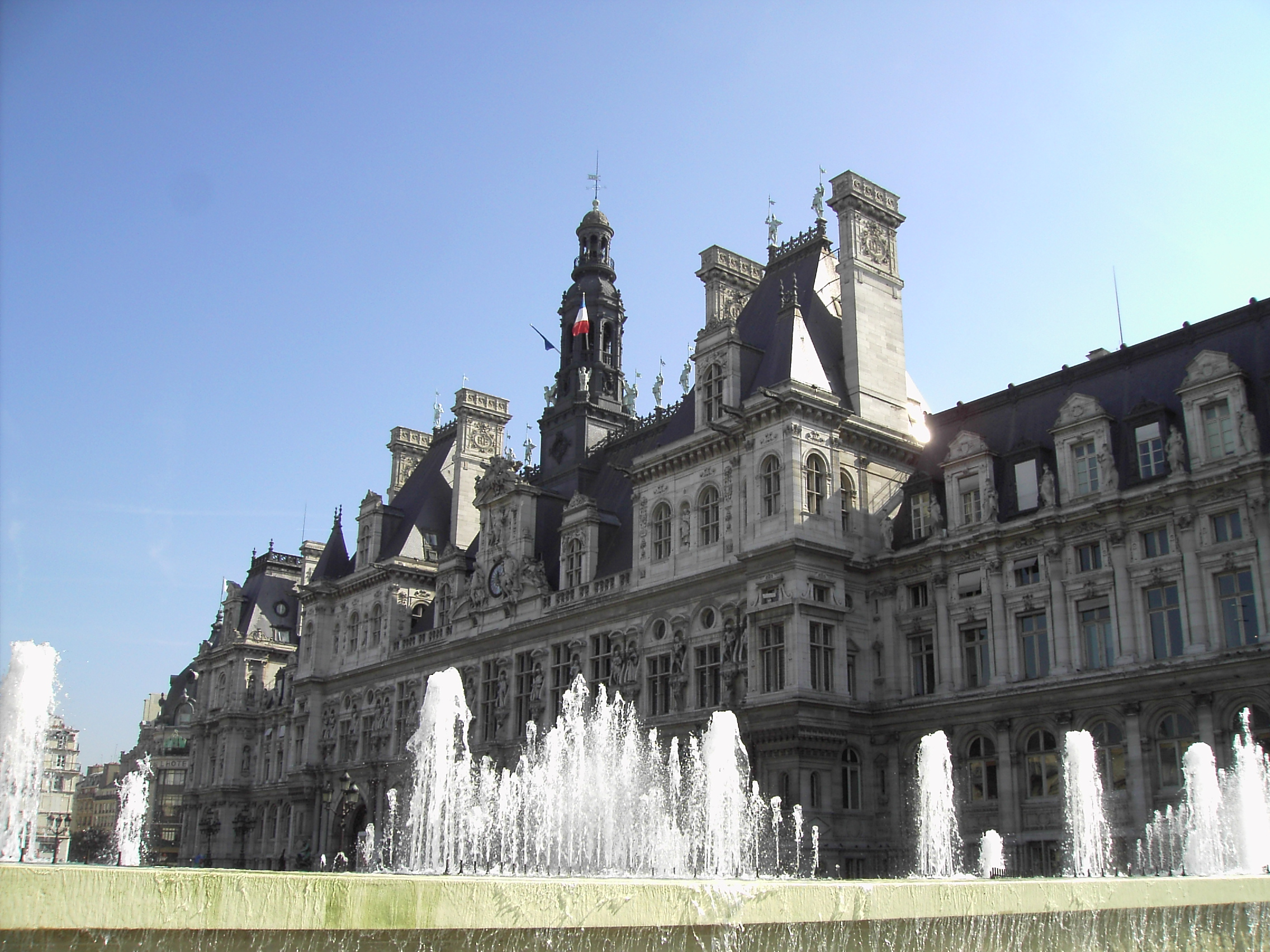 Paris, Hotel de Ville, sept.2005 by Lalupa